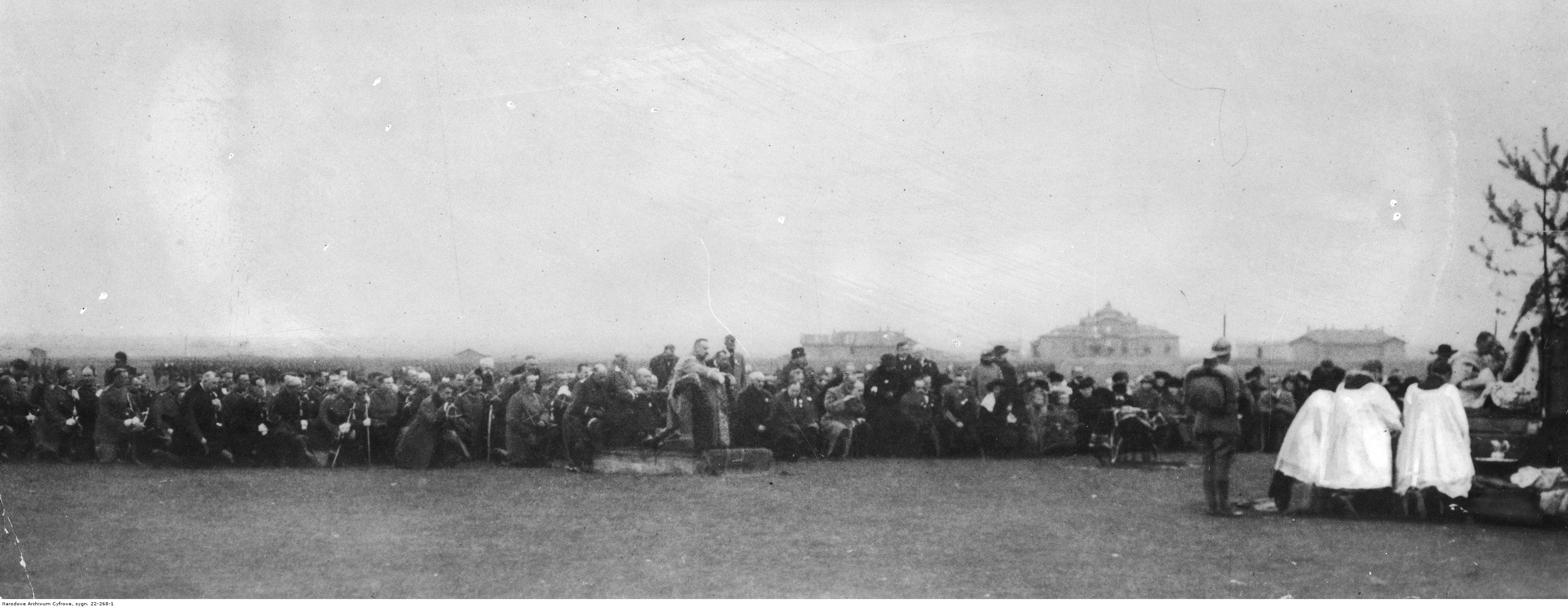 Fragment mszy polowej celebrowanej przez biskupa Ignacego Dub-Dubowskiego. Na klęczniku marszałek Józef Piłsudski.